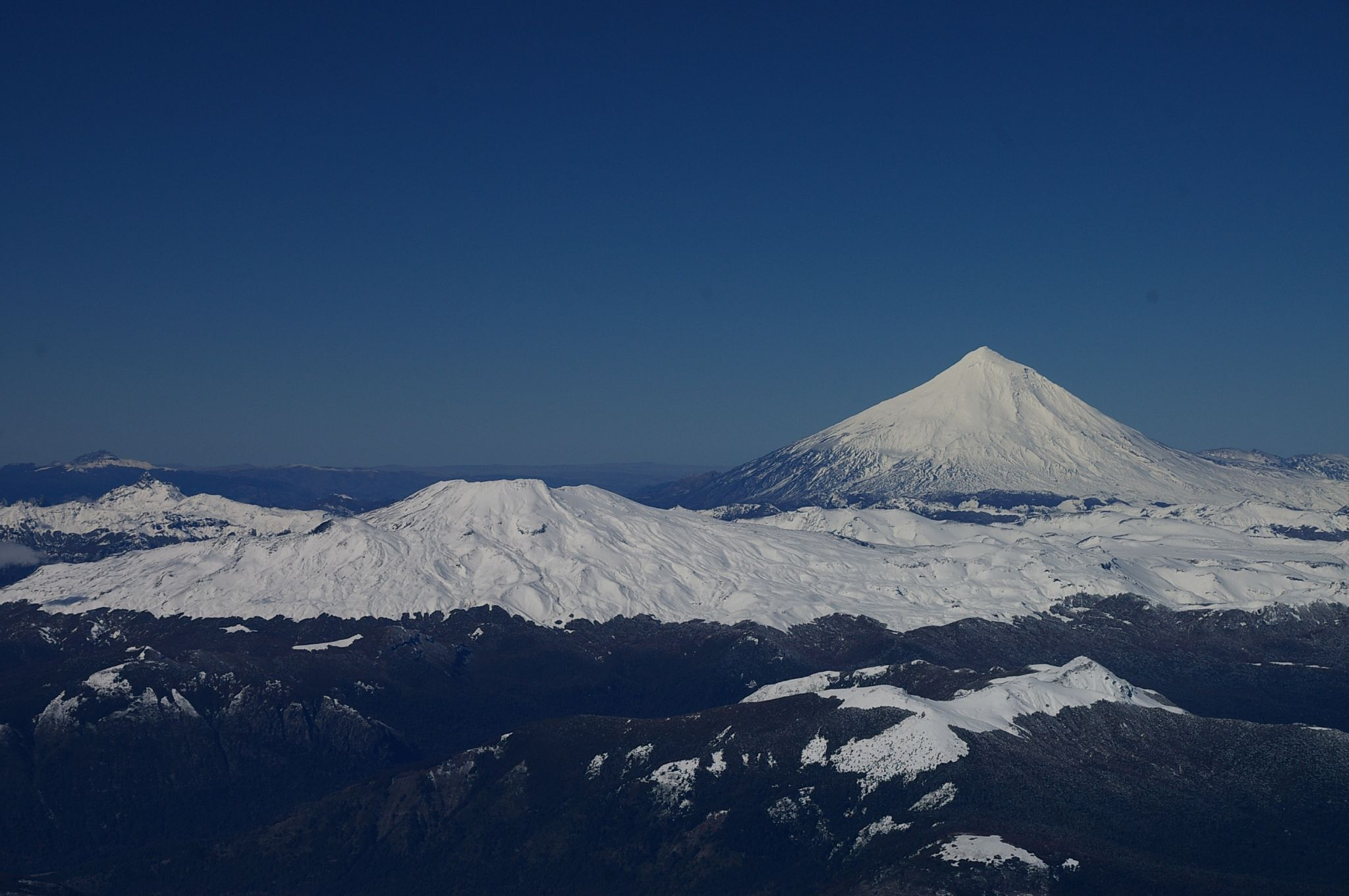 Quetrupillán and Lanín volcanoes, Andes